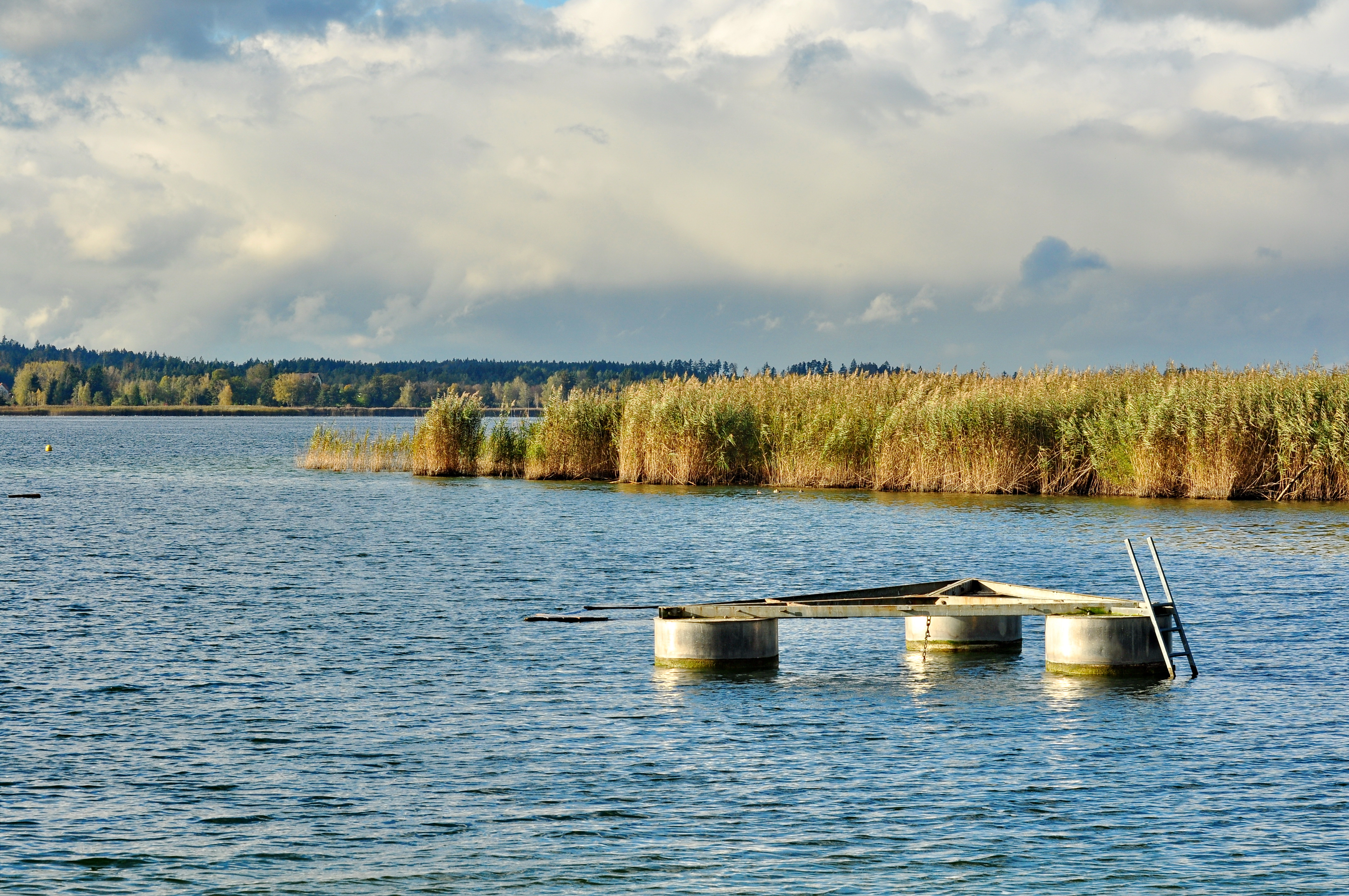 Pfäffikersee (Lake Pfäffikon) at the lido (Strandbad) in Auslikon (Switzerland)